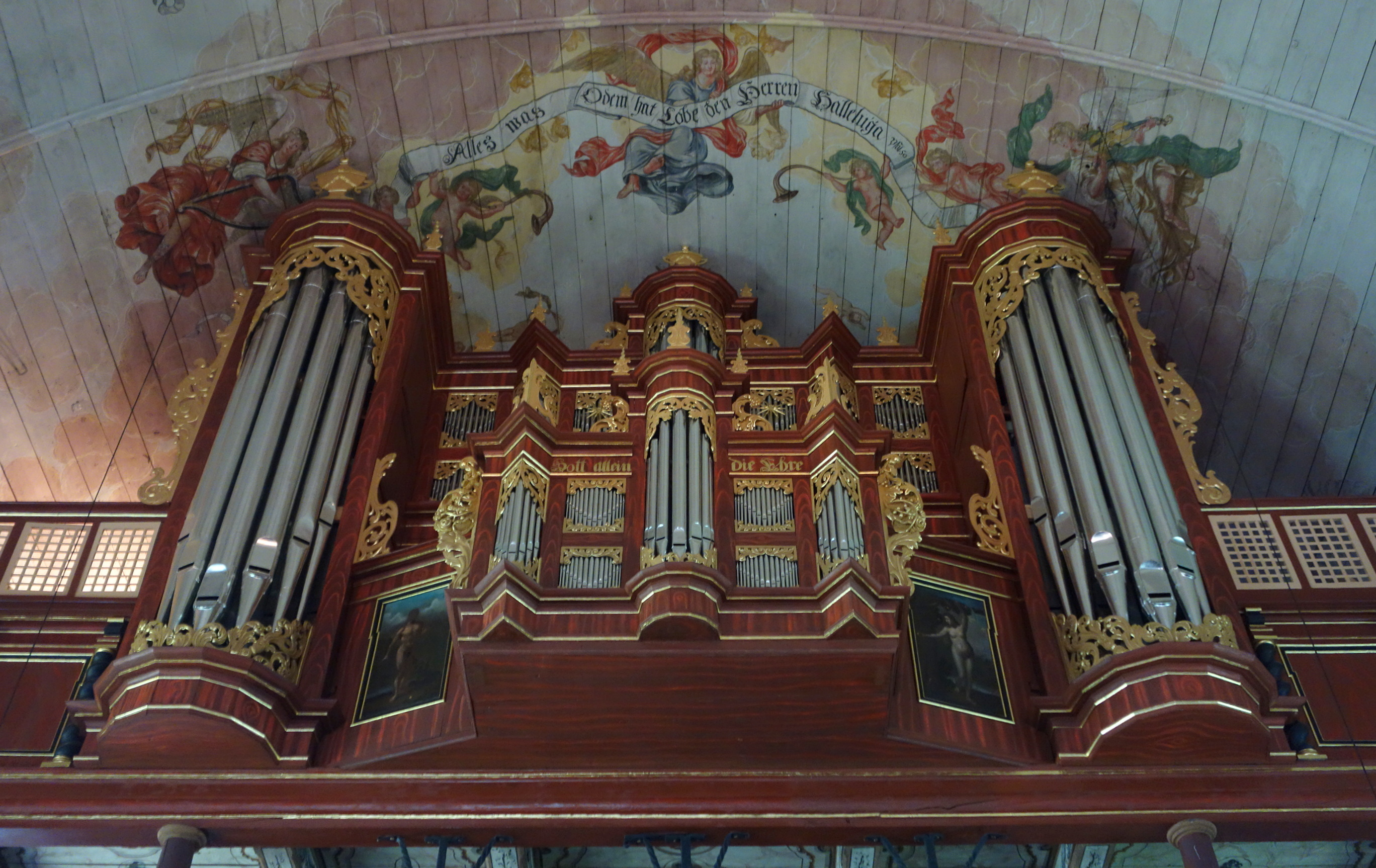 Orgel von St. Pankratius, Hamburg-Neuenfelde, Deutschland